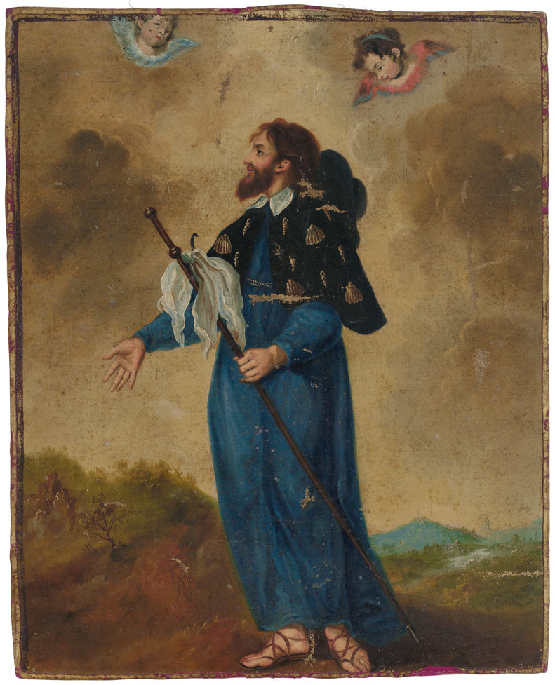 Kirchenfahne mit Taufe Christi (Vorderseite) und Hl. Jakobus (Rückseite); Rückseite: Hl. Jakobus d. Ä. im Pilgergewand (als Santiago-Pilger) Öl auf Leinwand. 75 x 60 cm